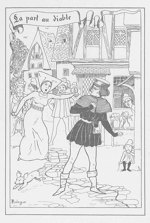 Cent Nouvelles nouvelles illustration - Project Gutenberg eText 18575 From Project Gutenberg's One Hundred Merrie And Delightsome Stories, by Various Illustration von Léon Lebègue zur 84. Geschichte